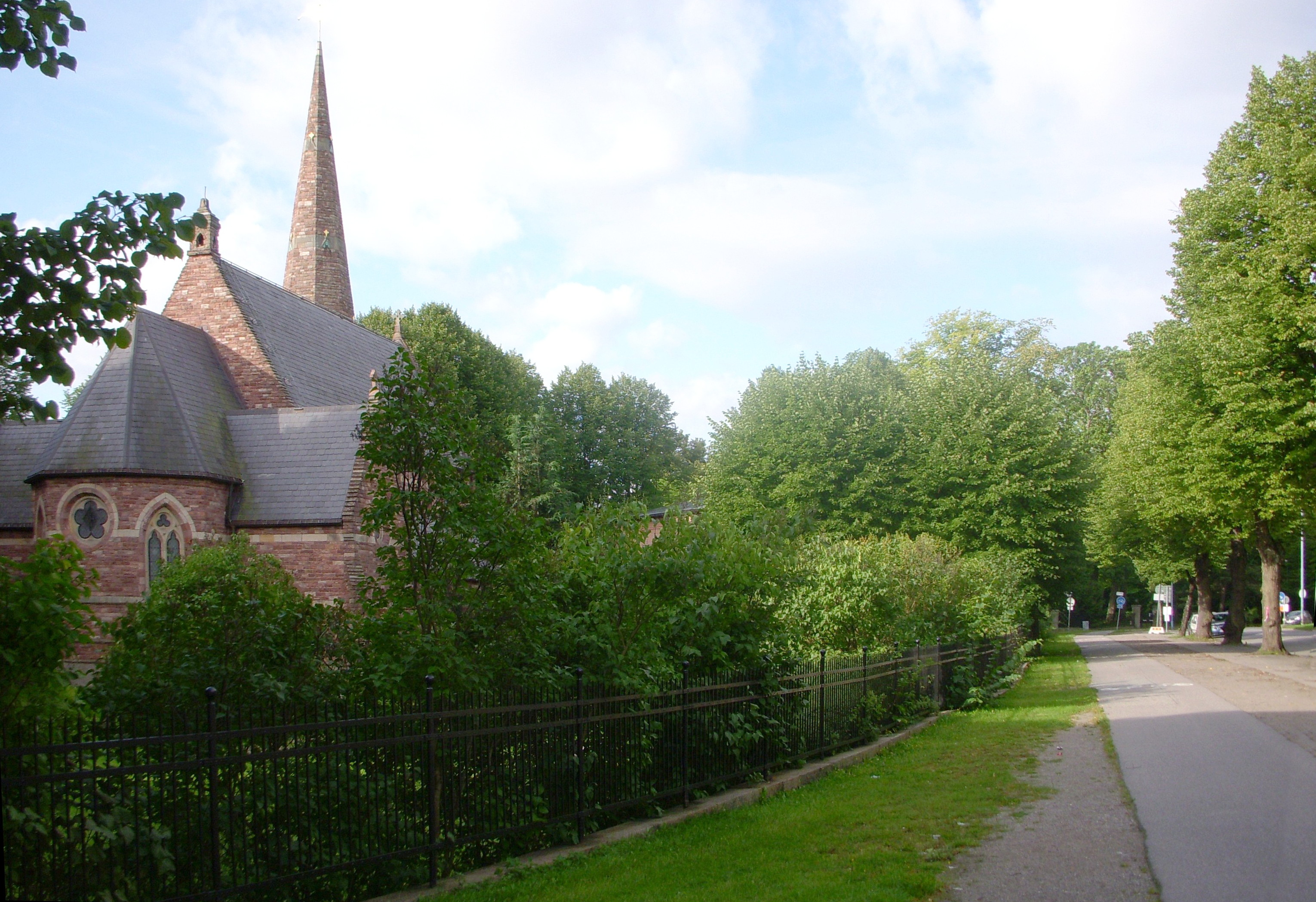 Dag Hammarsköjölds väg i Stockholm